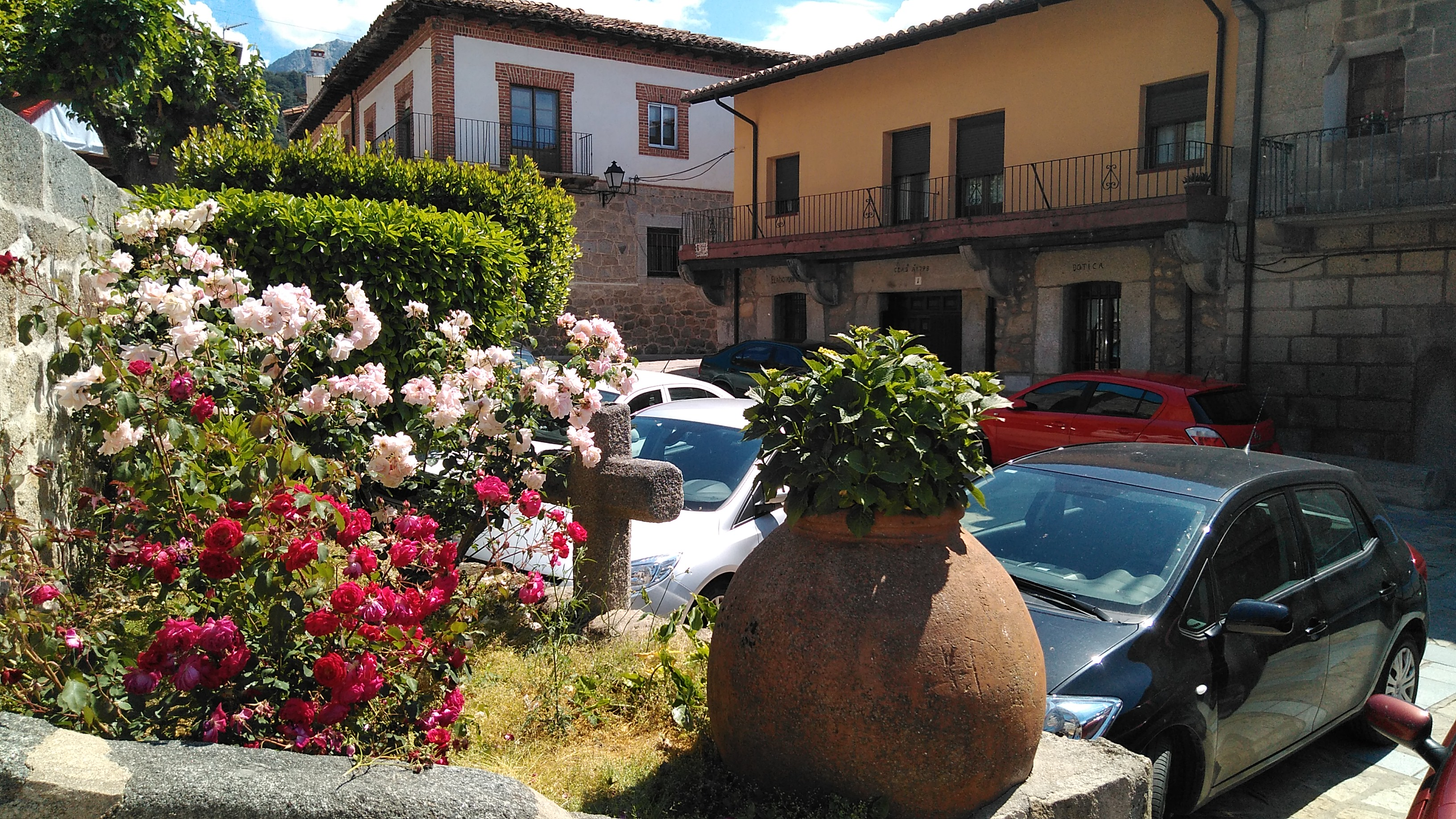 Arquitectura Pintoresca